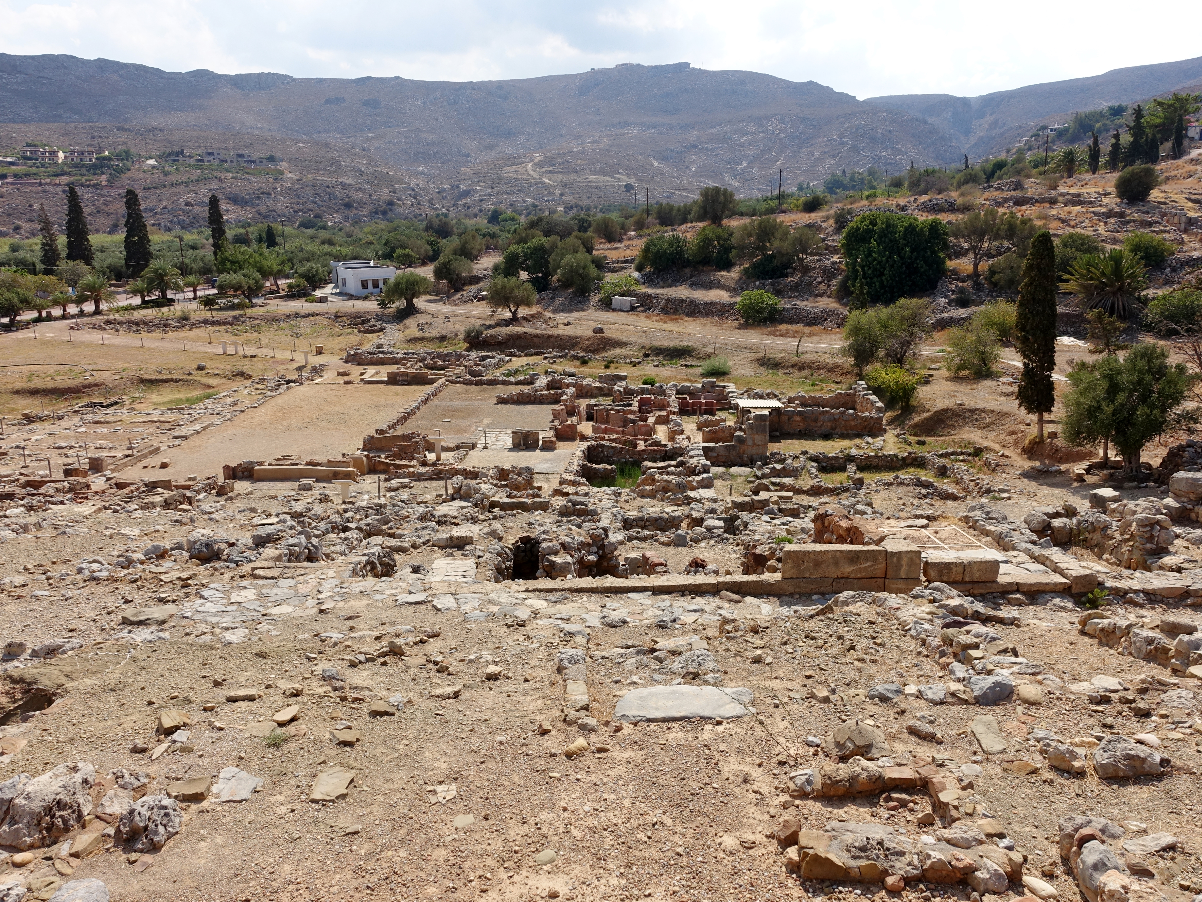 Palast von Zakros (Ανάκτορο της Ζάκρου) bei Kato Zakros (Κάτω Ζάκρος), Gemeinde Sitia, Kreta, Griechenland